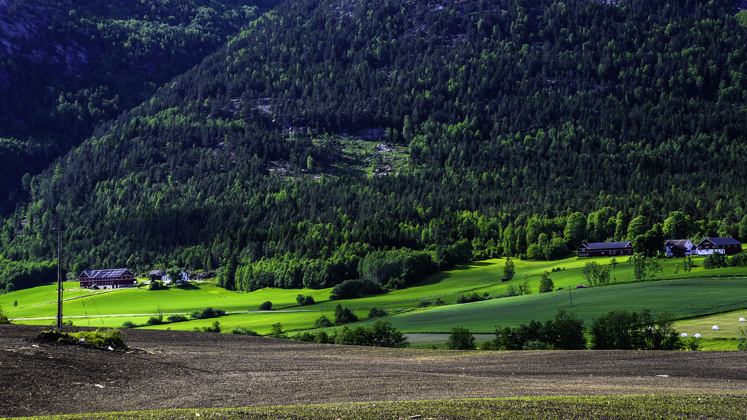 Gård fra Bø i Telemark